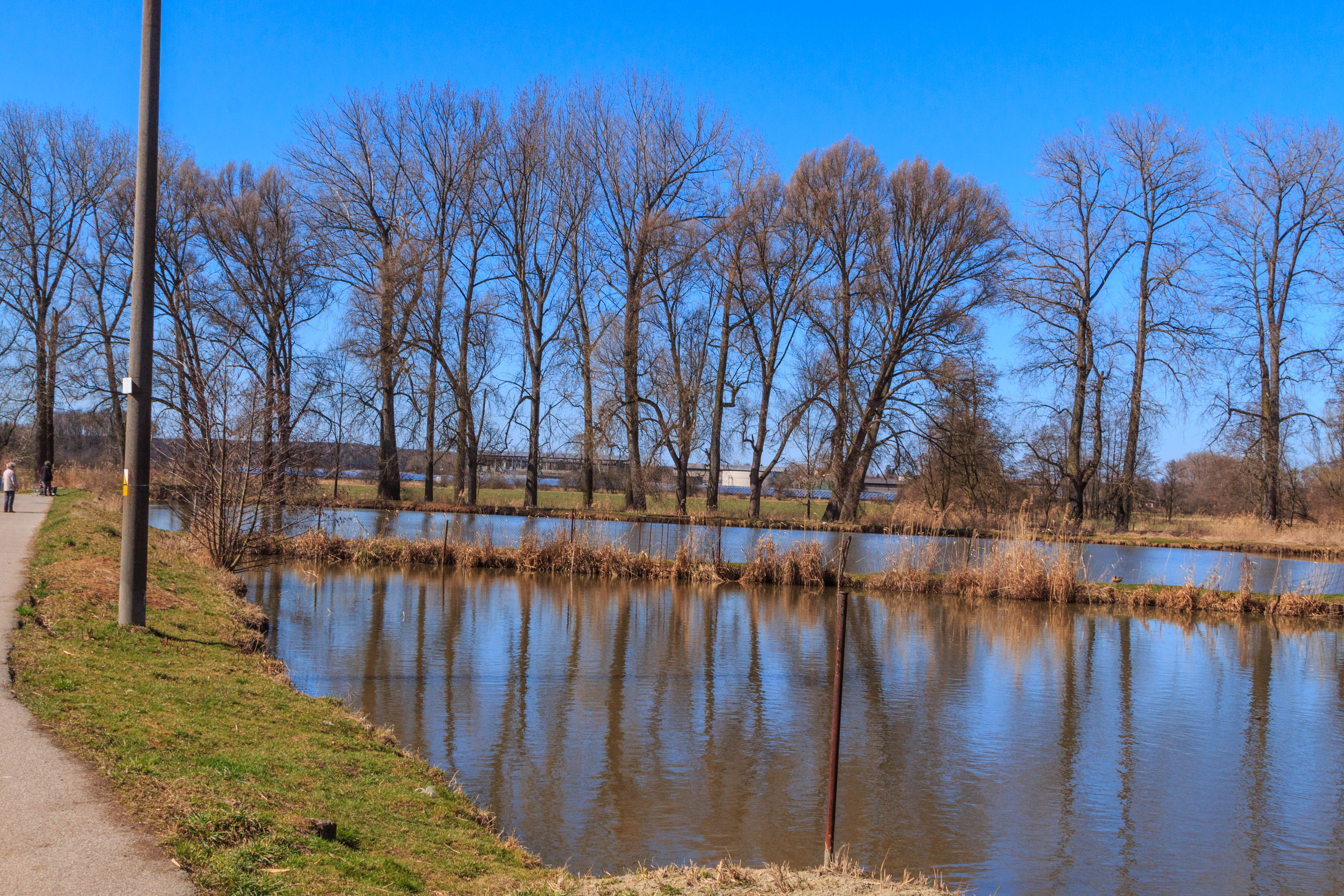 násadové rybníky Splav u Nechanic Project: Vodstvo